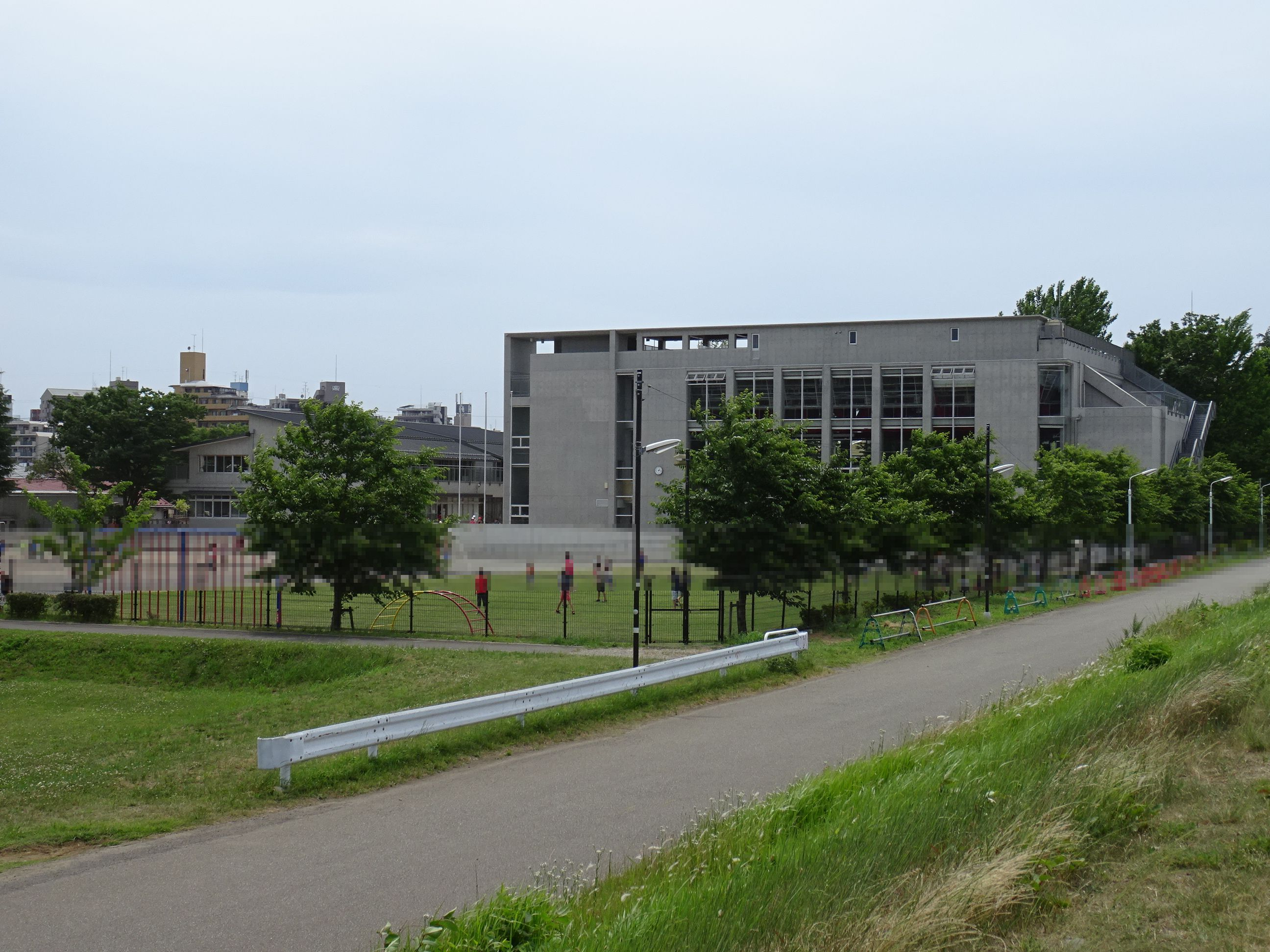 多摩市立多摩第一小学校（2015/06/02撮影）